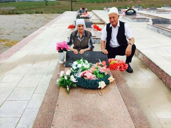 Prindërit e Skënderit tek varrezat e Dëshmorëve në Klinë